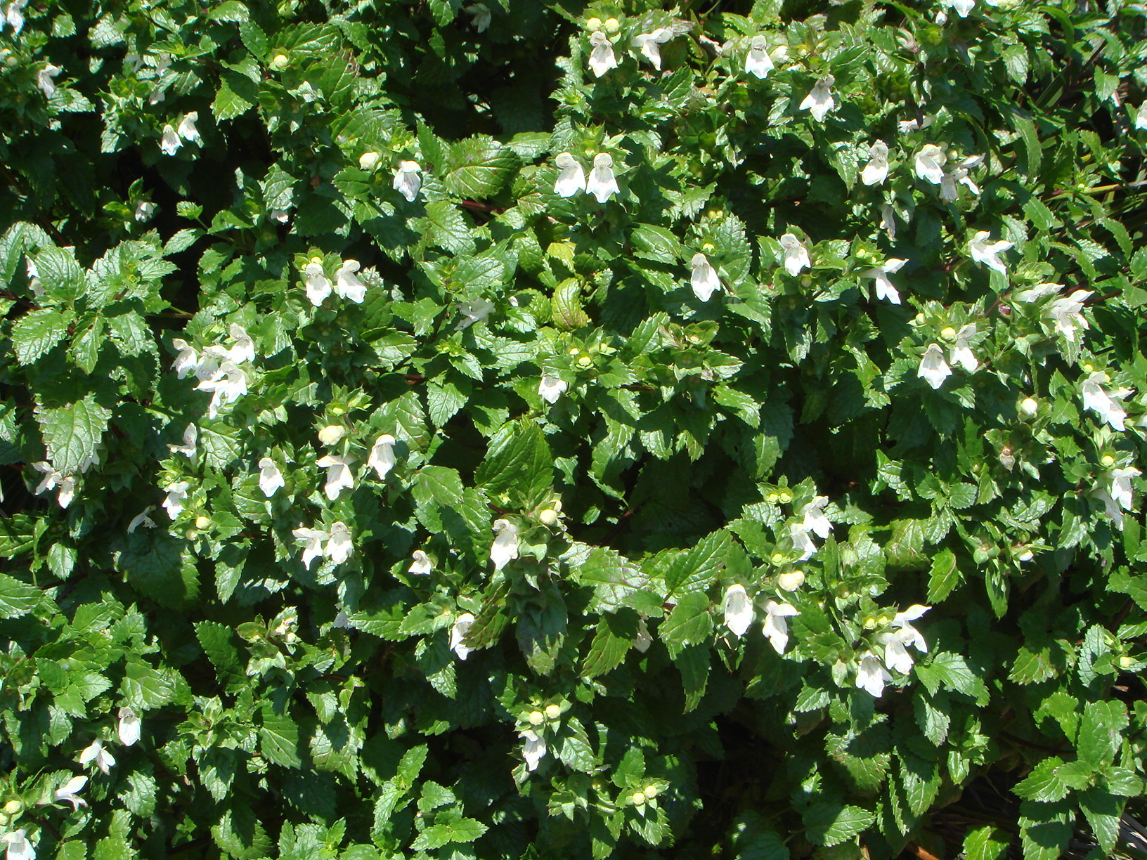 Prasium majus, Ceuta, España